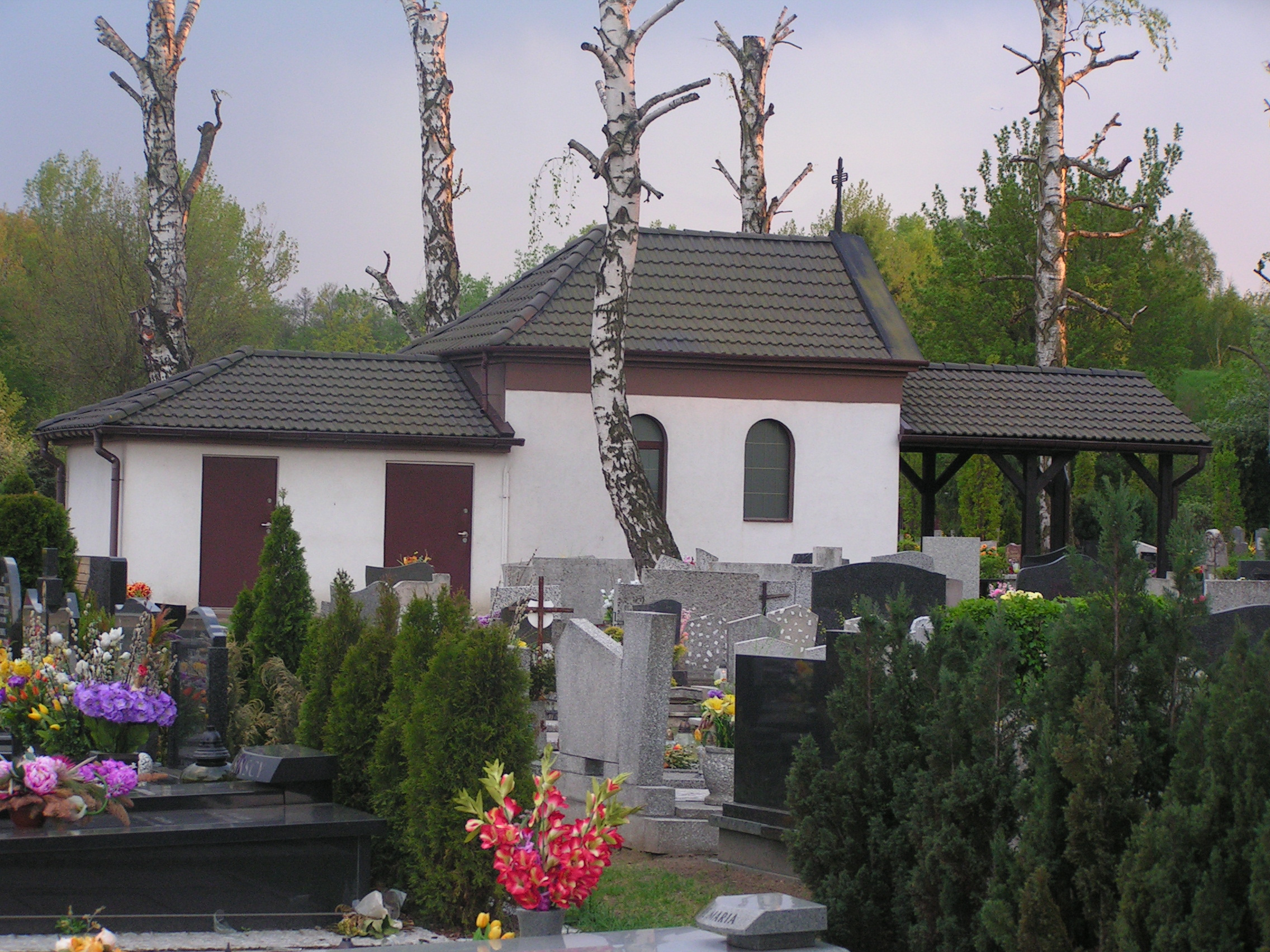 kaplica z boku